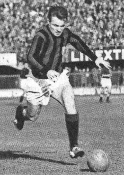 Il calciatore italo-brasiliano José João Altafini "Mazzola" in azione al Milan tra gli anni 50 e 60 del XX secolo.